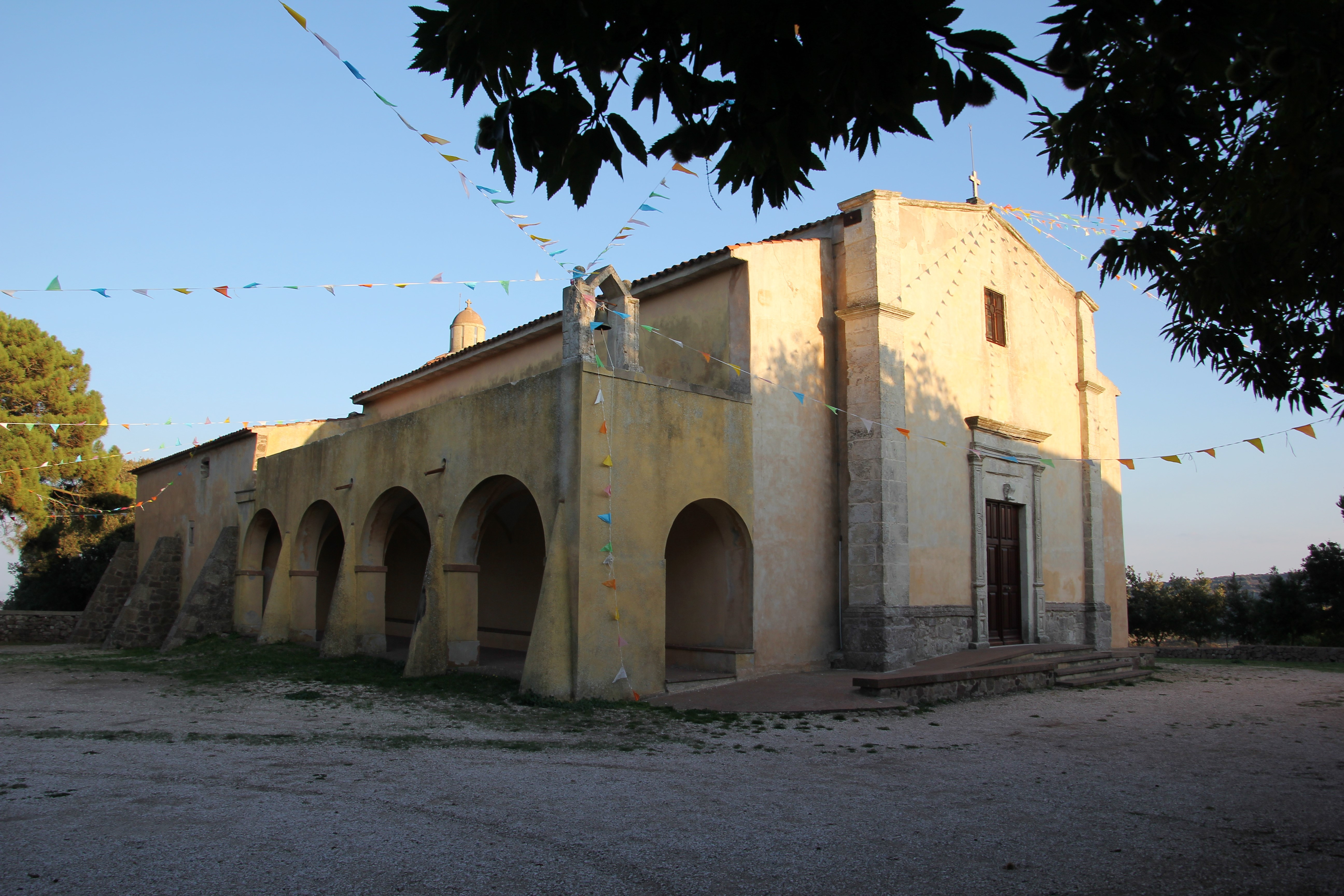 Villanova Monteleone, chiesa di Nostra Signora di Interrios